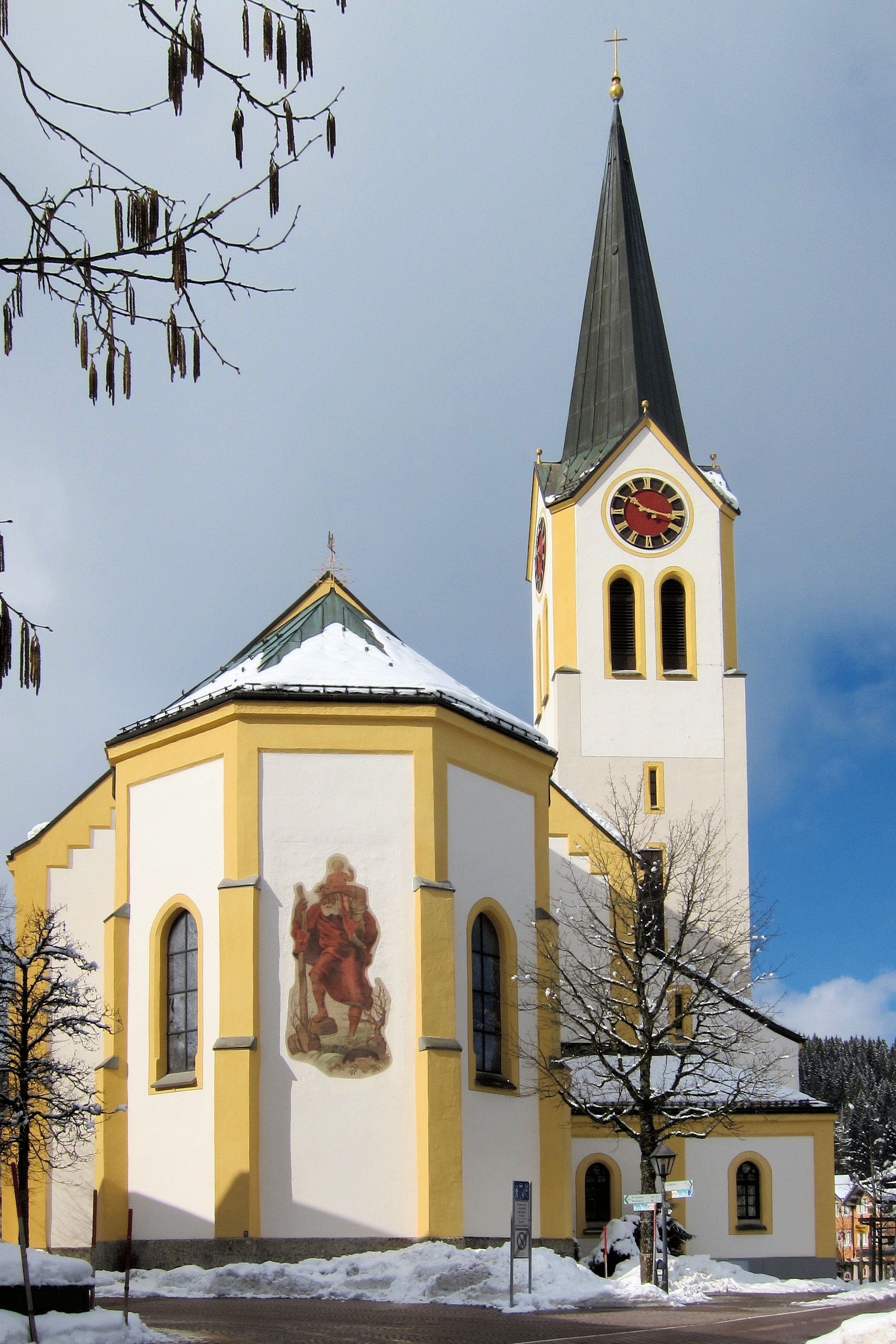 Kirche St. Peter und Paul in Oberstaufen (Algäu)